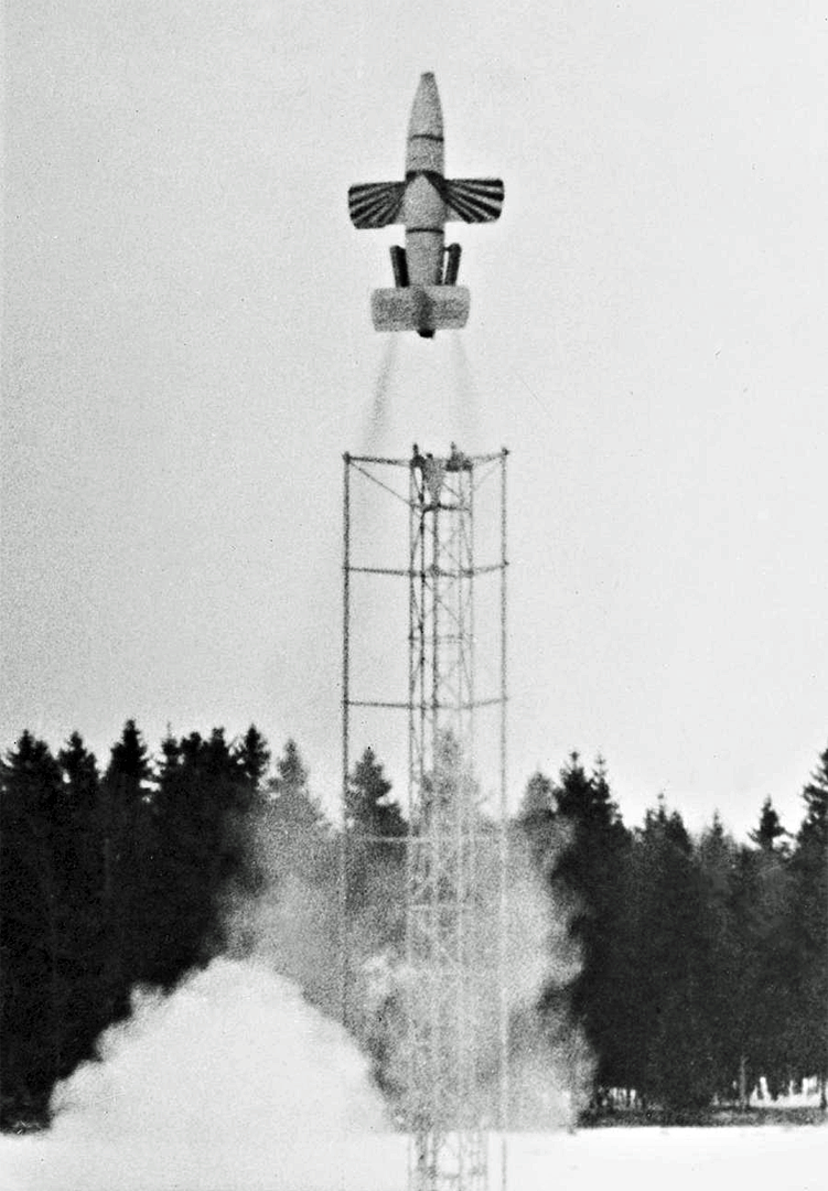 Bachem Ba 349 Raketen-Flugzeug, unbemannter Prototyp-Start 1944 in Deutschland